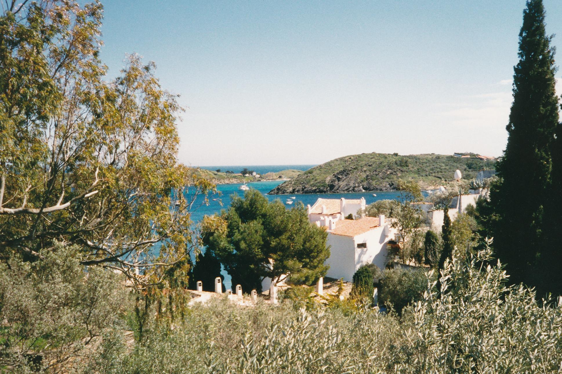 Blick über Port Lligat (Cadaques) und Salvador Dalis Wohnhaus Datum: 04/2006 Urheber: Michael Pfeiffer Quelle: privates Fotoalbum des Urhebers